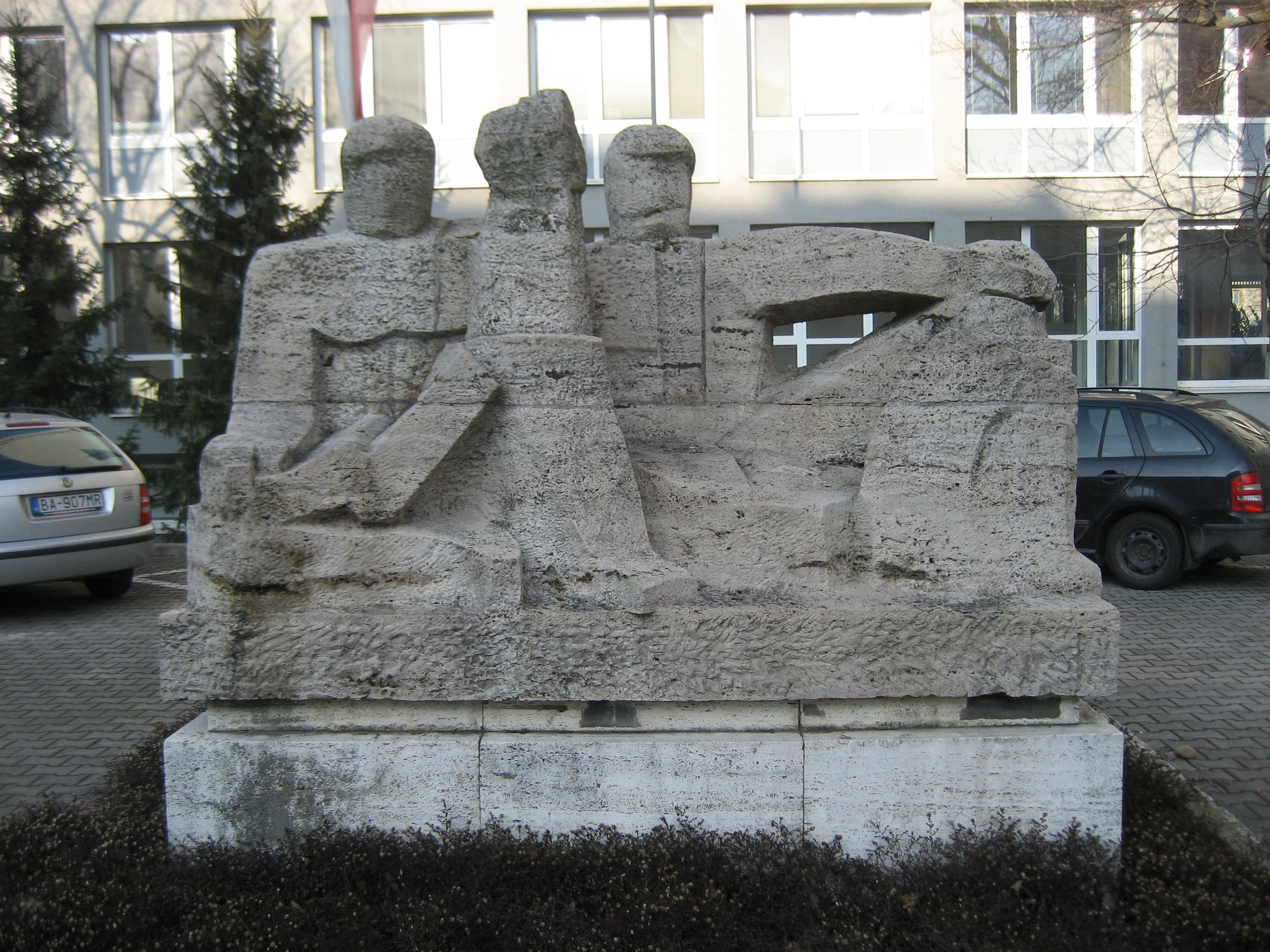 Skulptúra "Rodina" pred ŠD, Bernolákova 1 v Bratislave